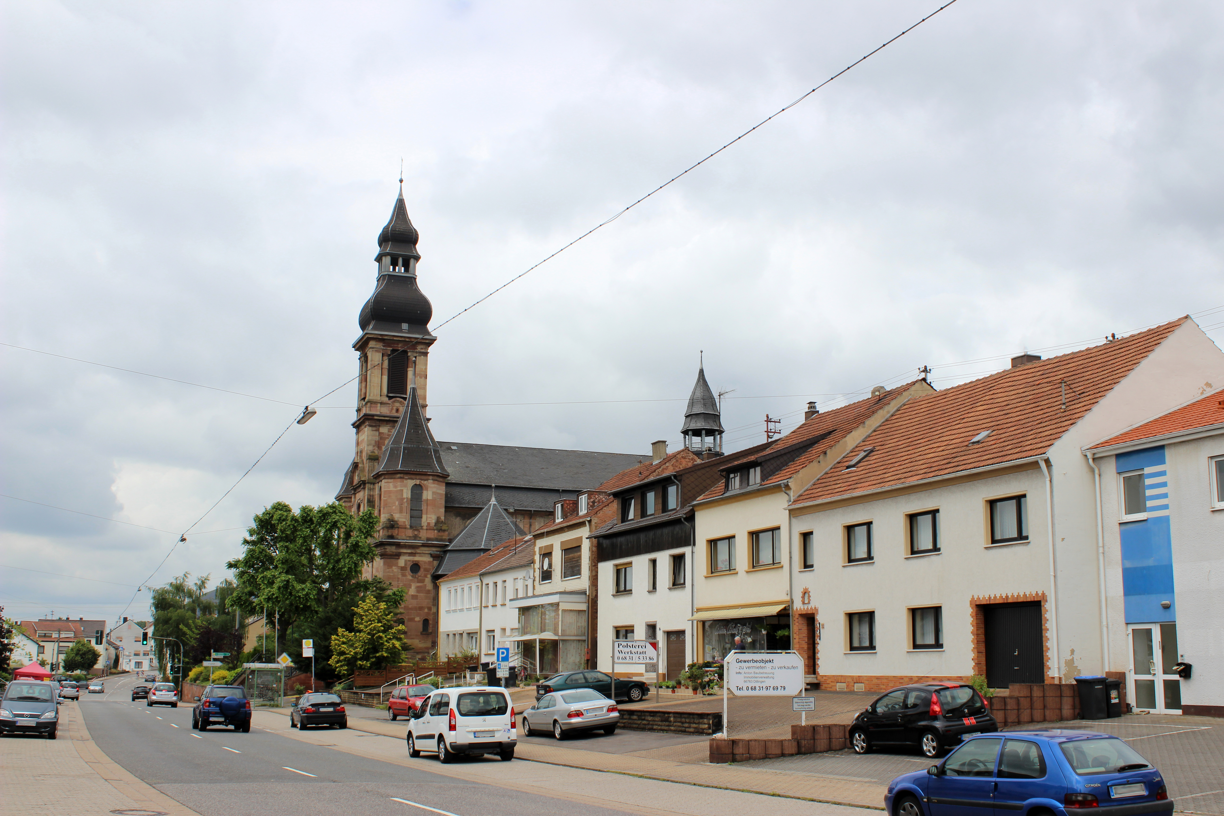 Laurentiusstraße in Hülzweiler, einem Ortsteil der Gemeinde Schwalbach, mit Blick auf die kath. Pfarrkirche St. Laurentius